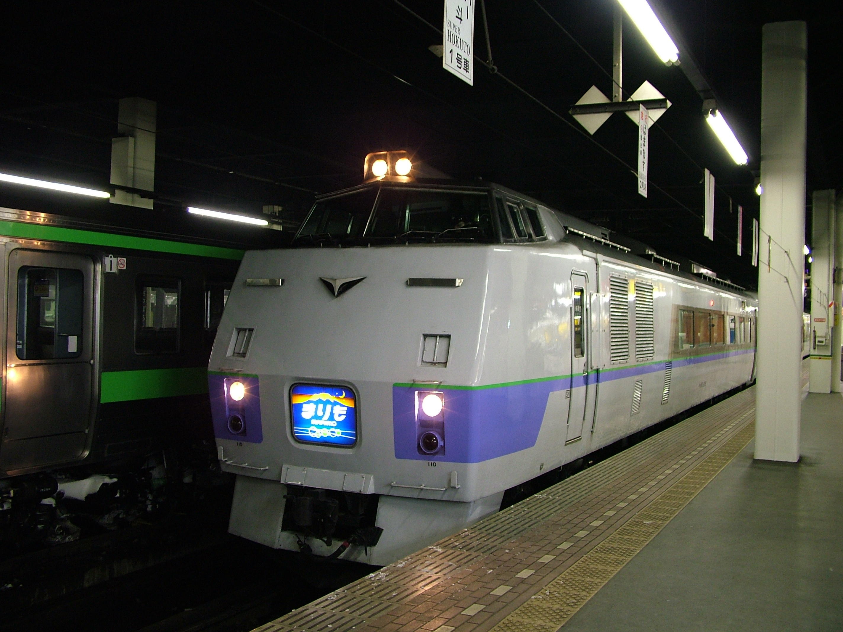 夜行特急まりも